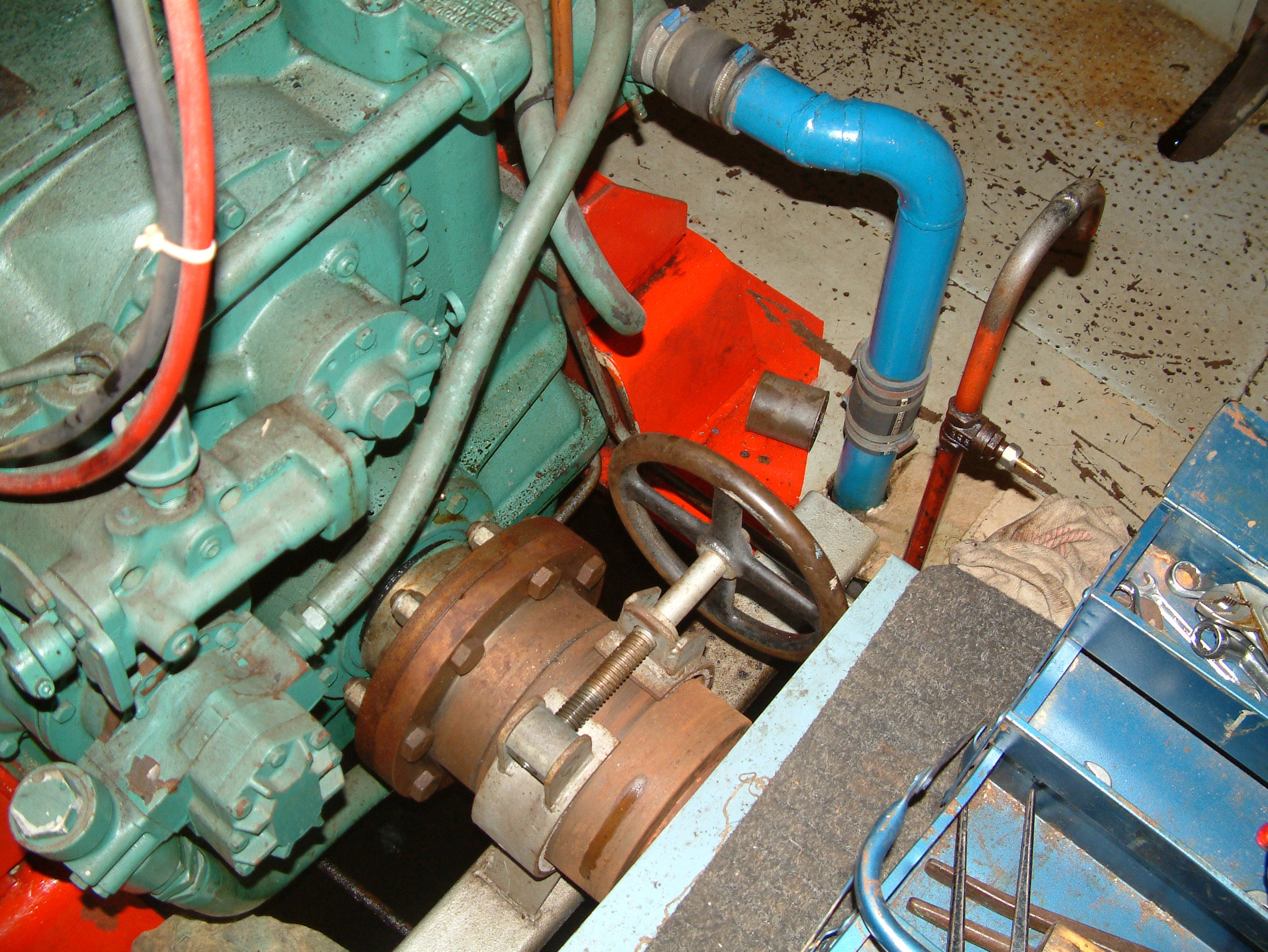 De motor van de TERRA NOVA, het schip van de LVBHB, de Parel van de Rijn.